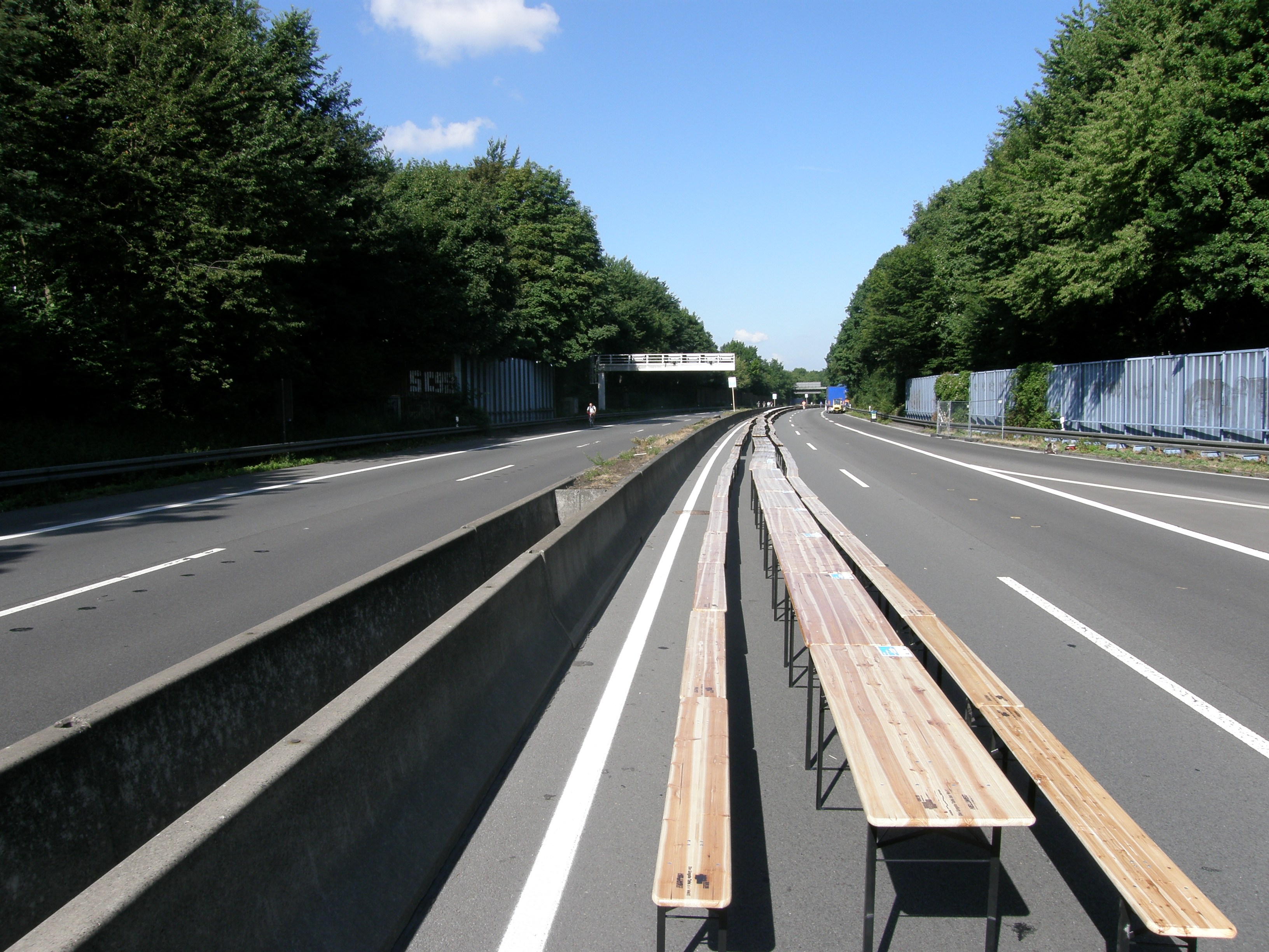 Still-Leben Ruhrschnellweg, Standort Bochum-Harpen